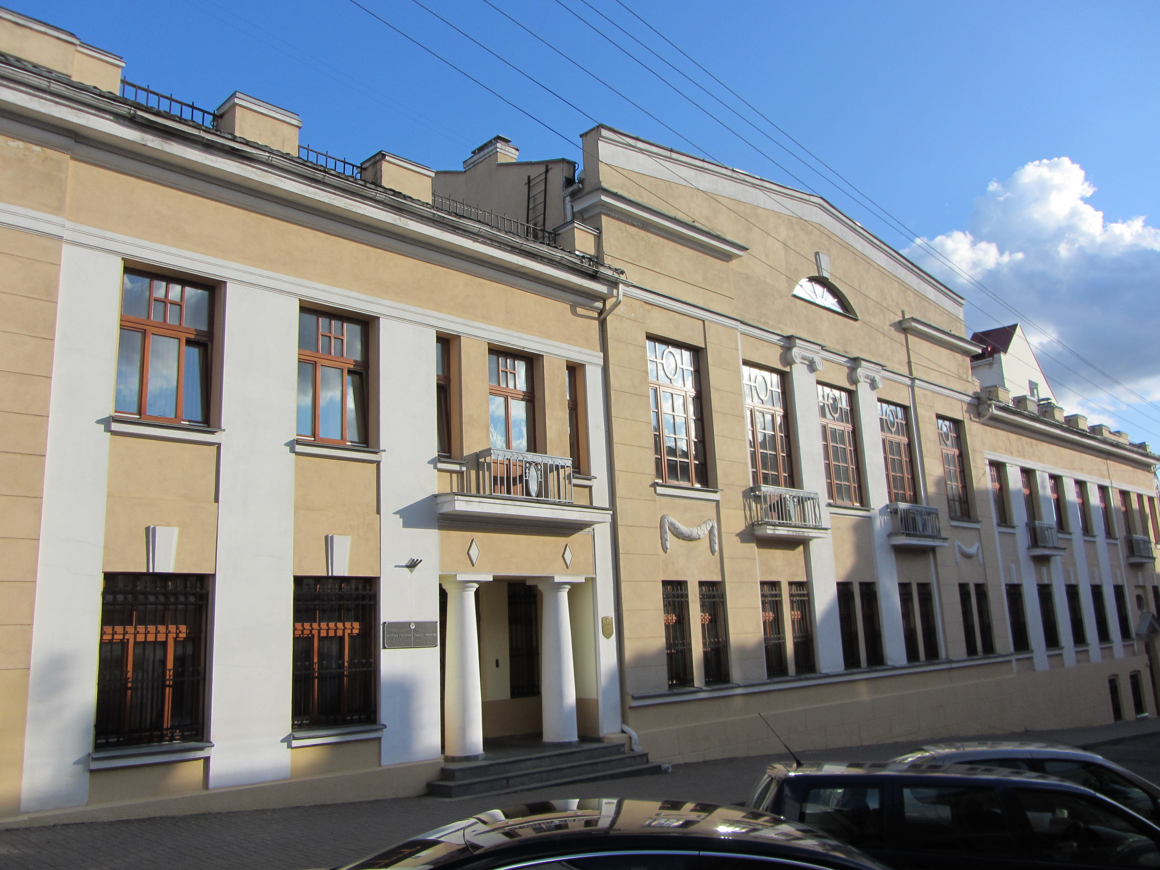 Беларуская (тарашкевіца): Вуліца Рэвалюцыйная, 3